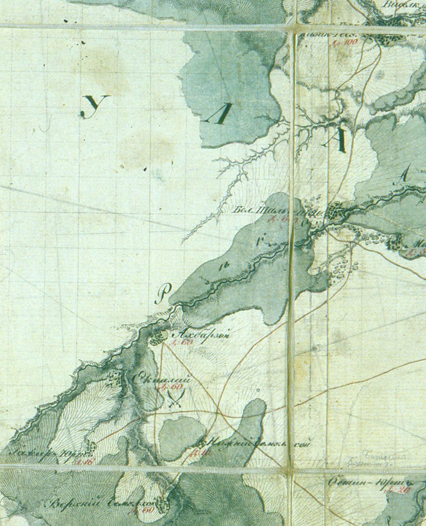 Село Ахбарзой